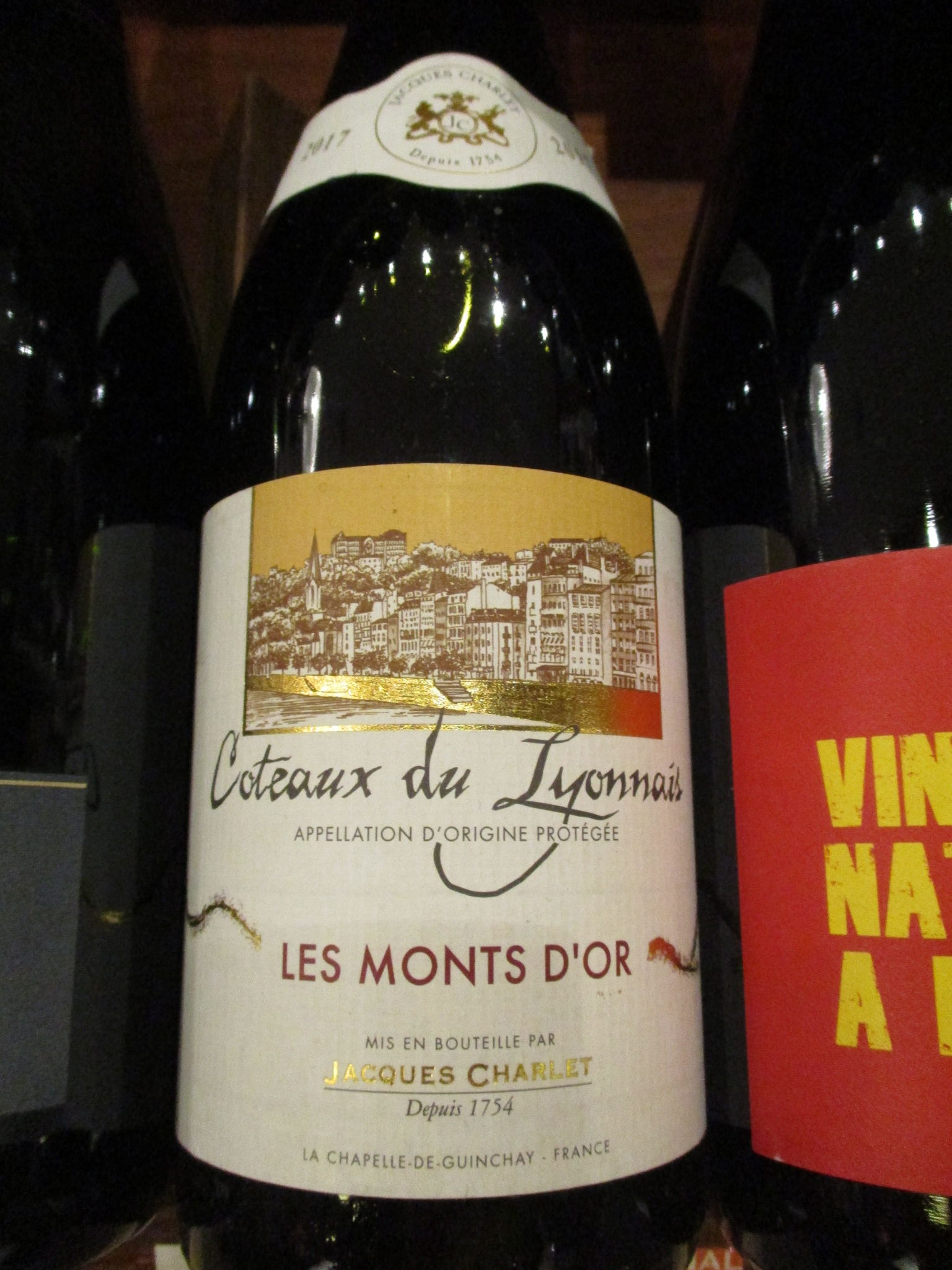 Halles de Lyon-Paul Bocuse (coteaux-du-lyonnais AOC)